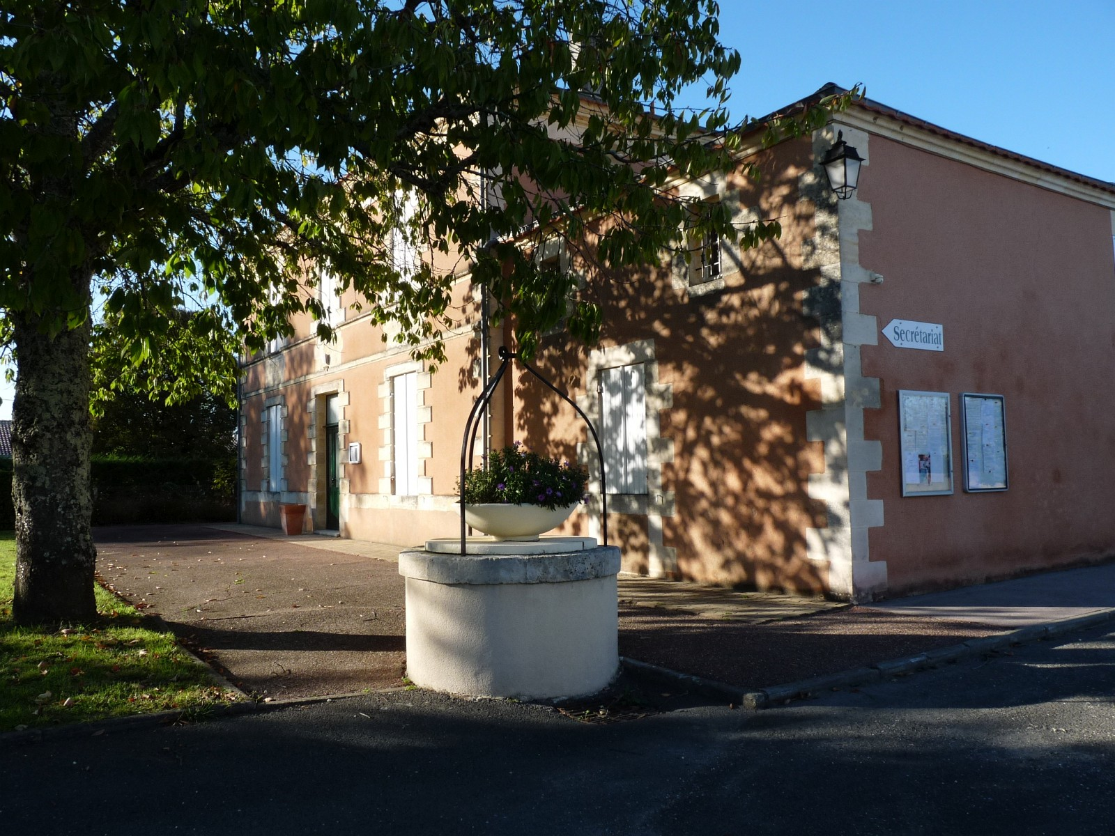 Mairie de Saint-Seurin-de-Cursac, Gironde, France